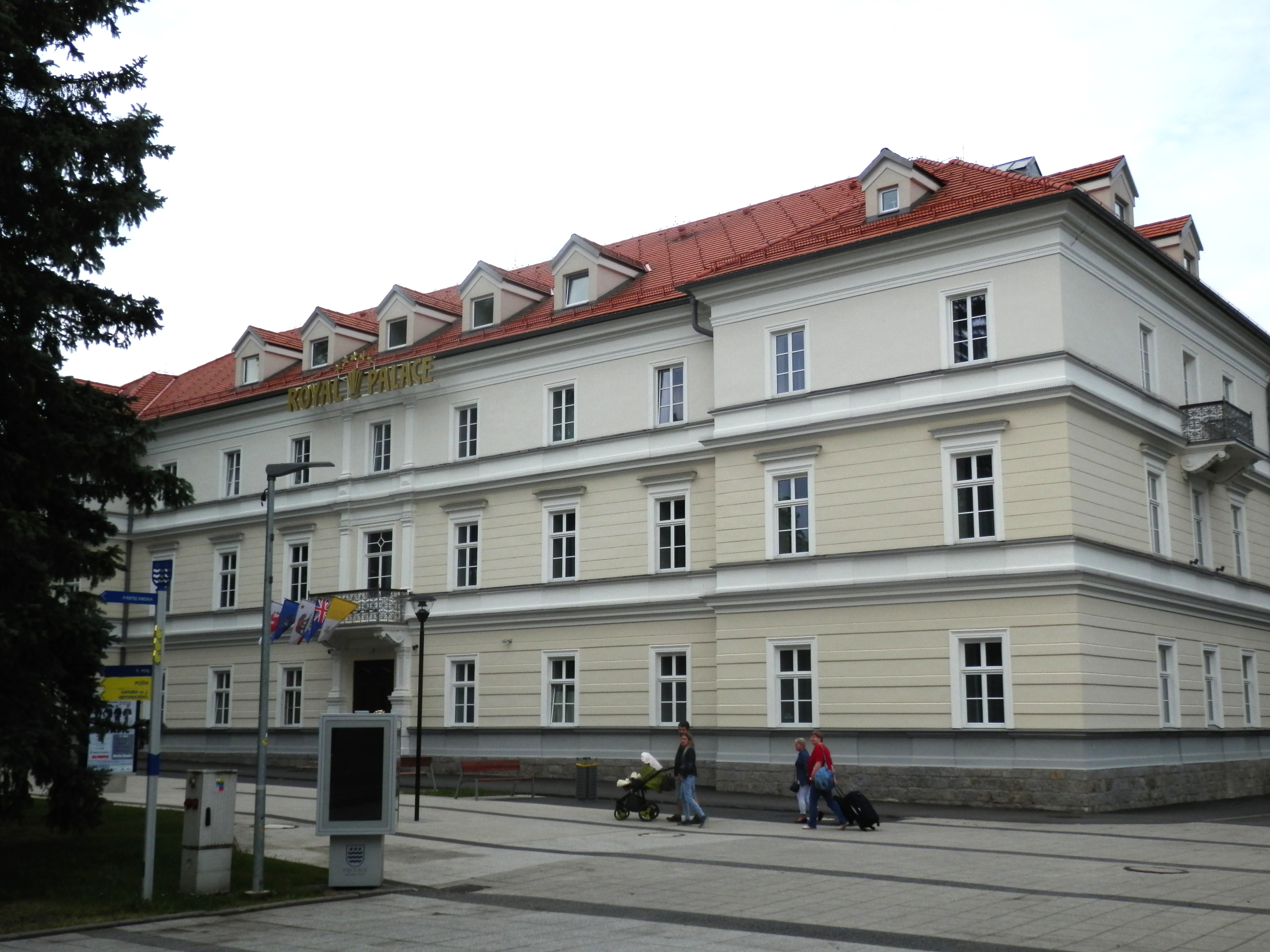 Jún 2019. Kúpeľné a okresné mesto Turčianske Teplice. Slovensko.